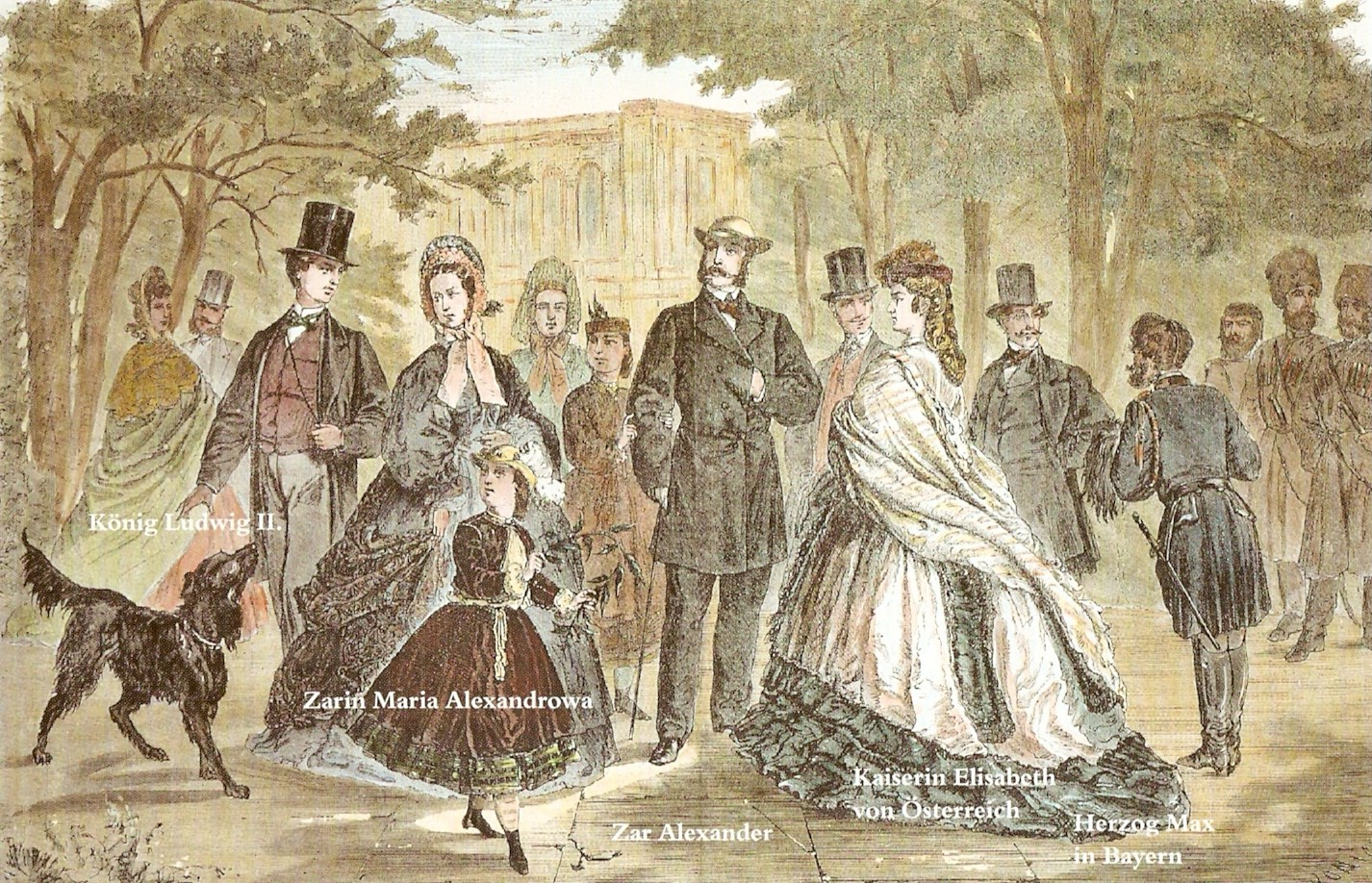 First „Kaiserkur“ with VIP-guests in Bad Kissingen in 1864